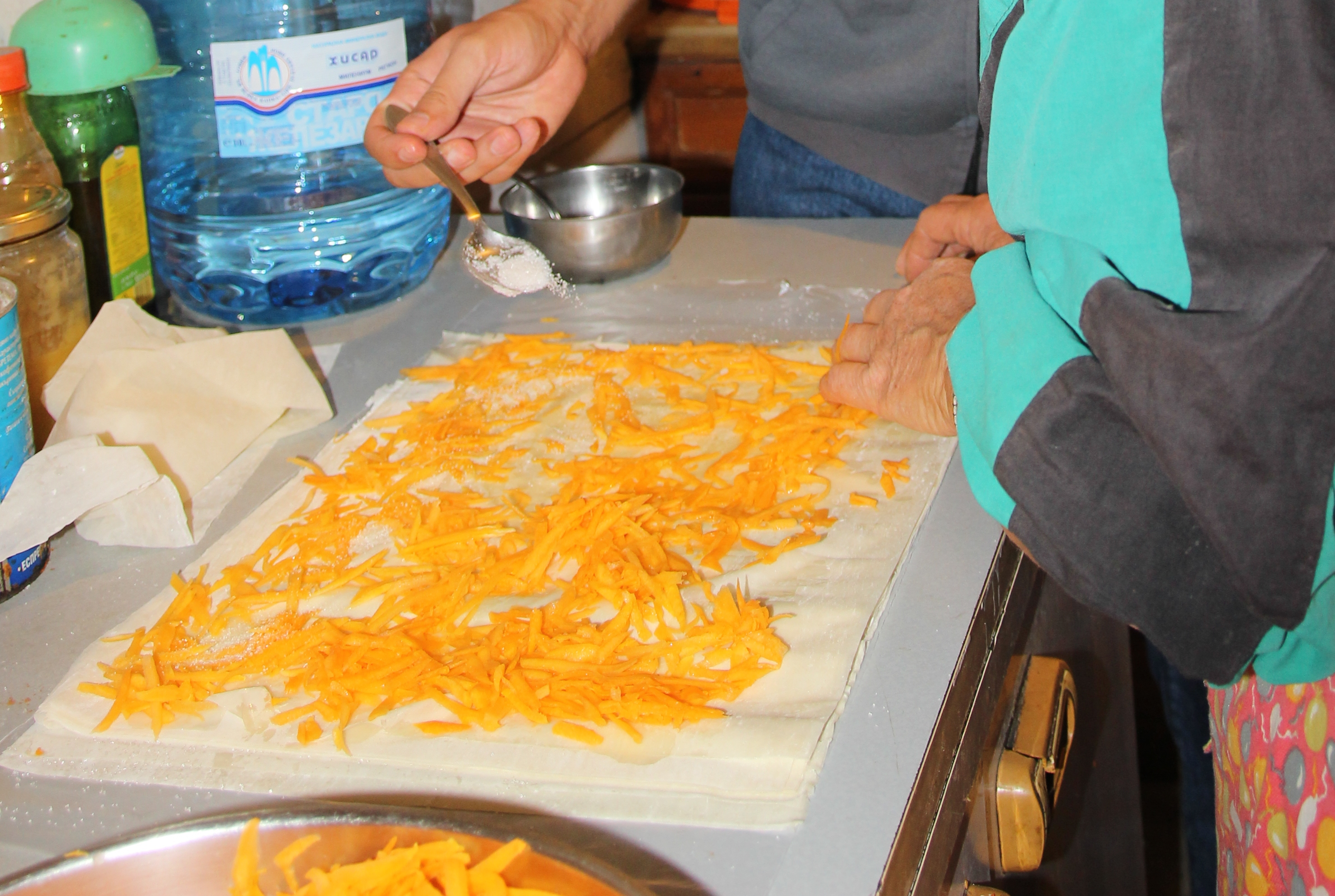 Gabrovnicában bolti tésztalapok és saját termesztésű sütőtök felhasználásával készül a tikvenik. A tésztalapokat egyesével olajozzák, reszelt sütőtökkel, kristálycukorral és fahéjjal hintik meg, majd 2-3 réteg után feltekerik és sütőbe helyezik egymás mellé.